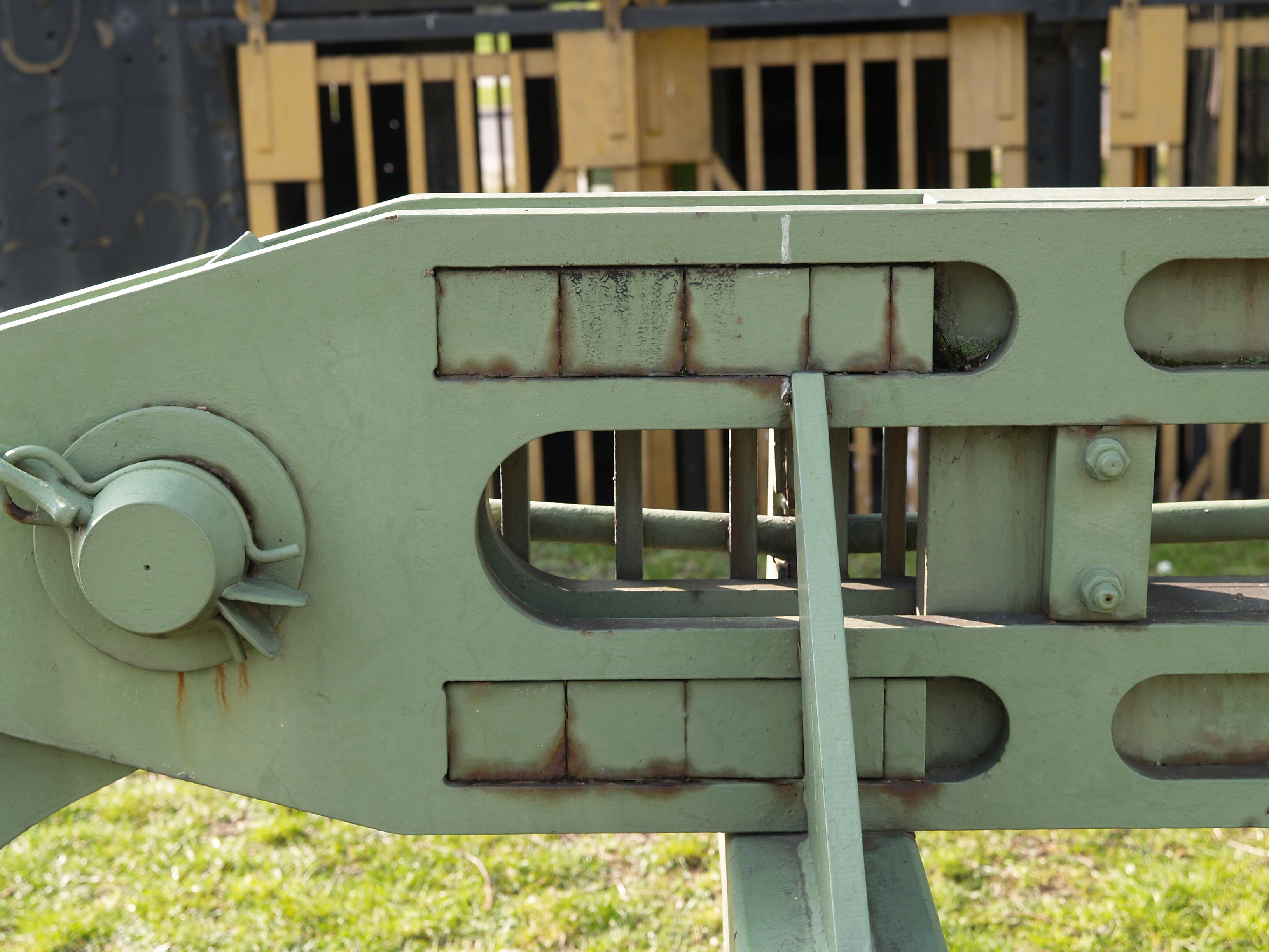 Aufgebocktes Zwischengeschirr, das Element zur Verbindung eines Förderkorbes mit dem Förderseil, Detail Ausgleichsvorrichtung, vor dem Förderschacht der ehemaligen Zeche Erin in Castrop Rauxel. Im Betrieb ist die rechte Seite oben.